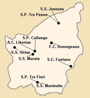 Répartition des clubs en Serie A1 1992-1993.